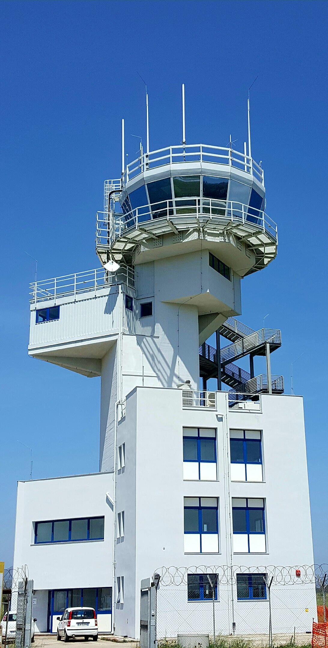 Torre di controllo ENAV dell'Aeroporto di Alghero, dopo la ristrutturazione del 2016.